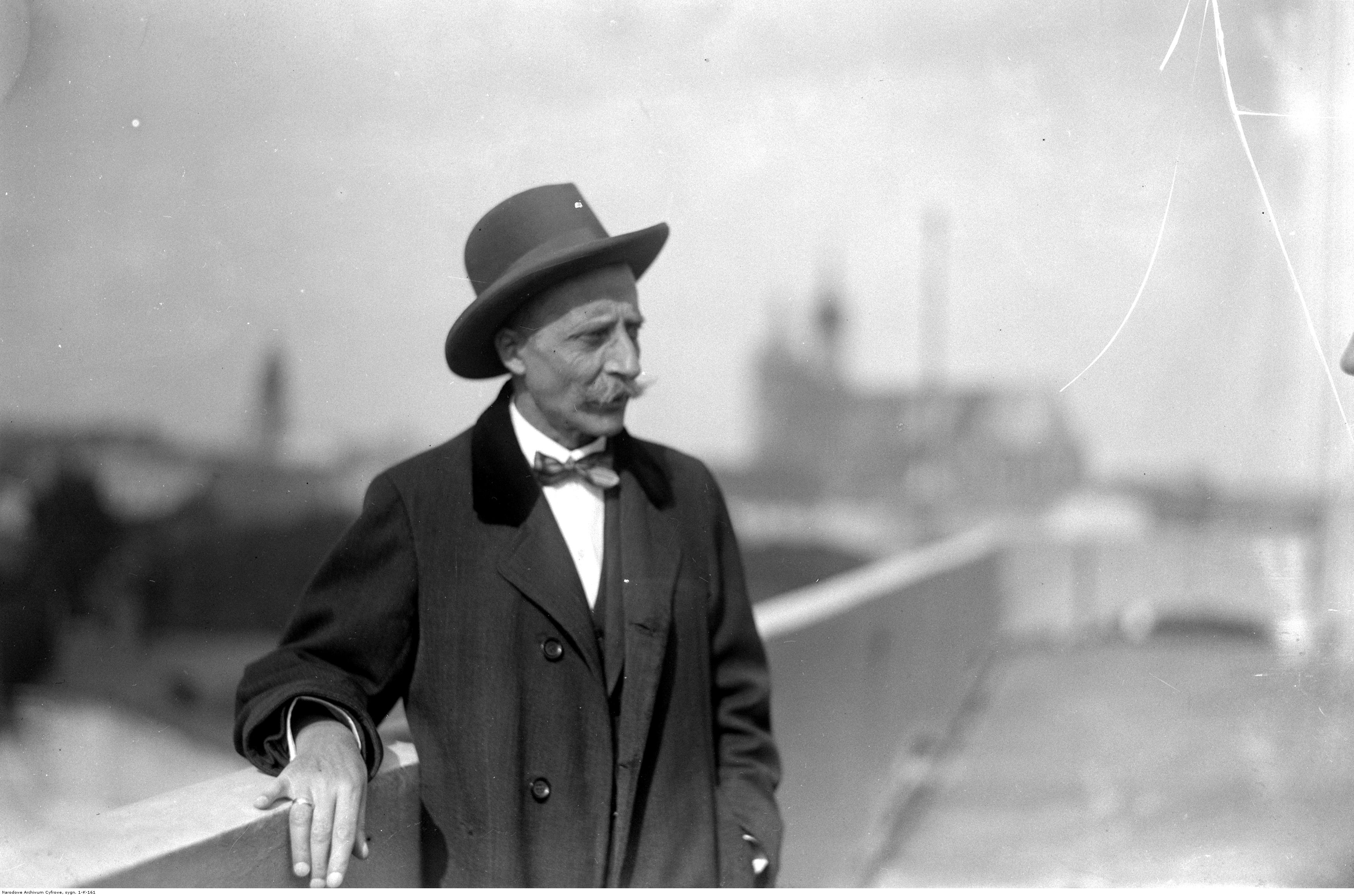 Zdjęcie z Maciejem Szukiewiczem. Photographs available at are public domain or the owner of the copy rights is the State Treasury of Poland, represented by the National Digital Archive and which grant free of charge licence for free use of the materials on all known exploitation fields.